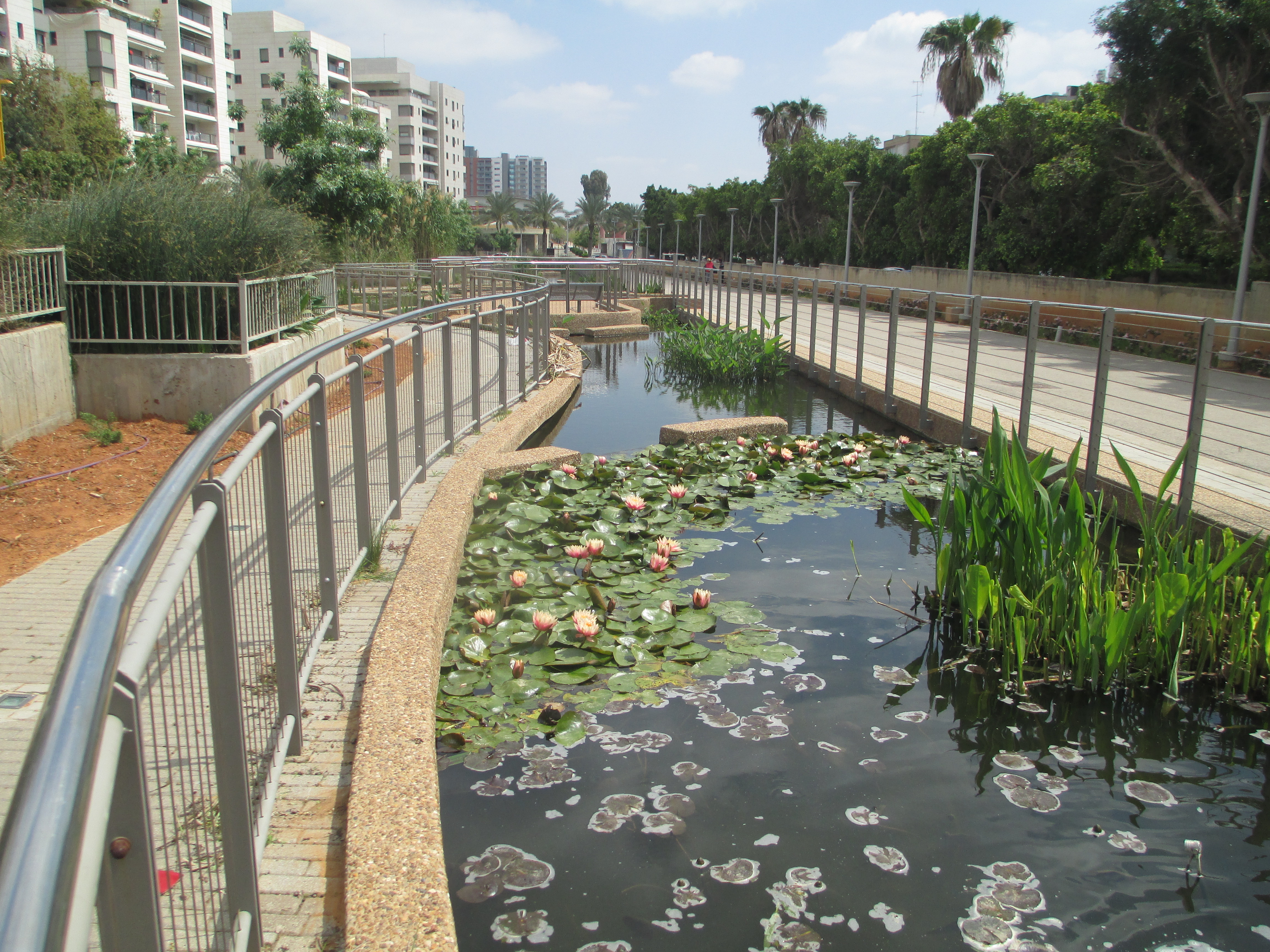 בריכות אקולוגיות בגני תקווה